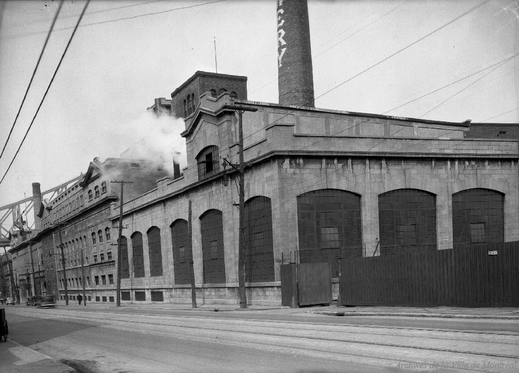 Brasserie Molson, rue Notre-Dame, Montréal